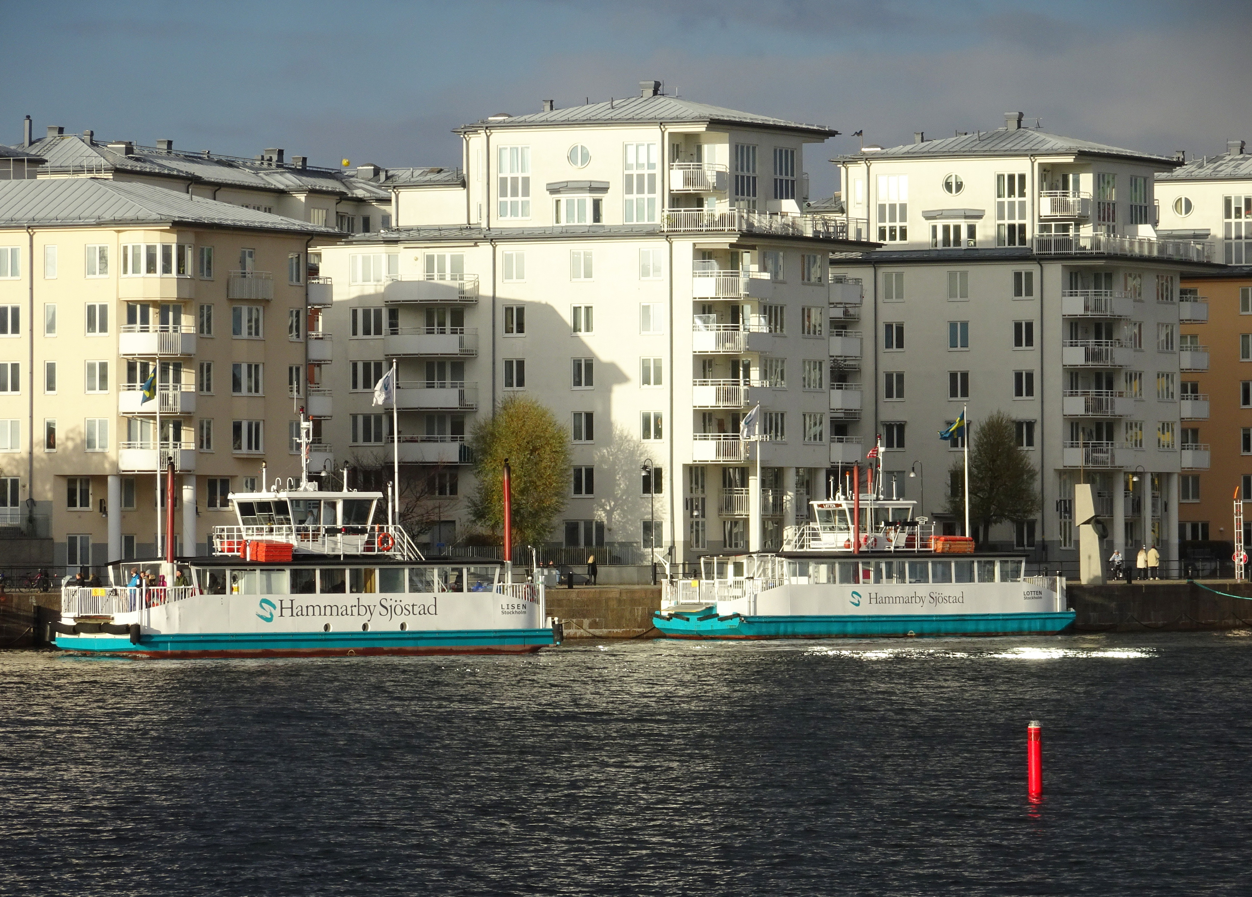 Hammarby sjöstad Hammarbyfärjorna Lisen och Lotten